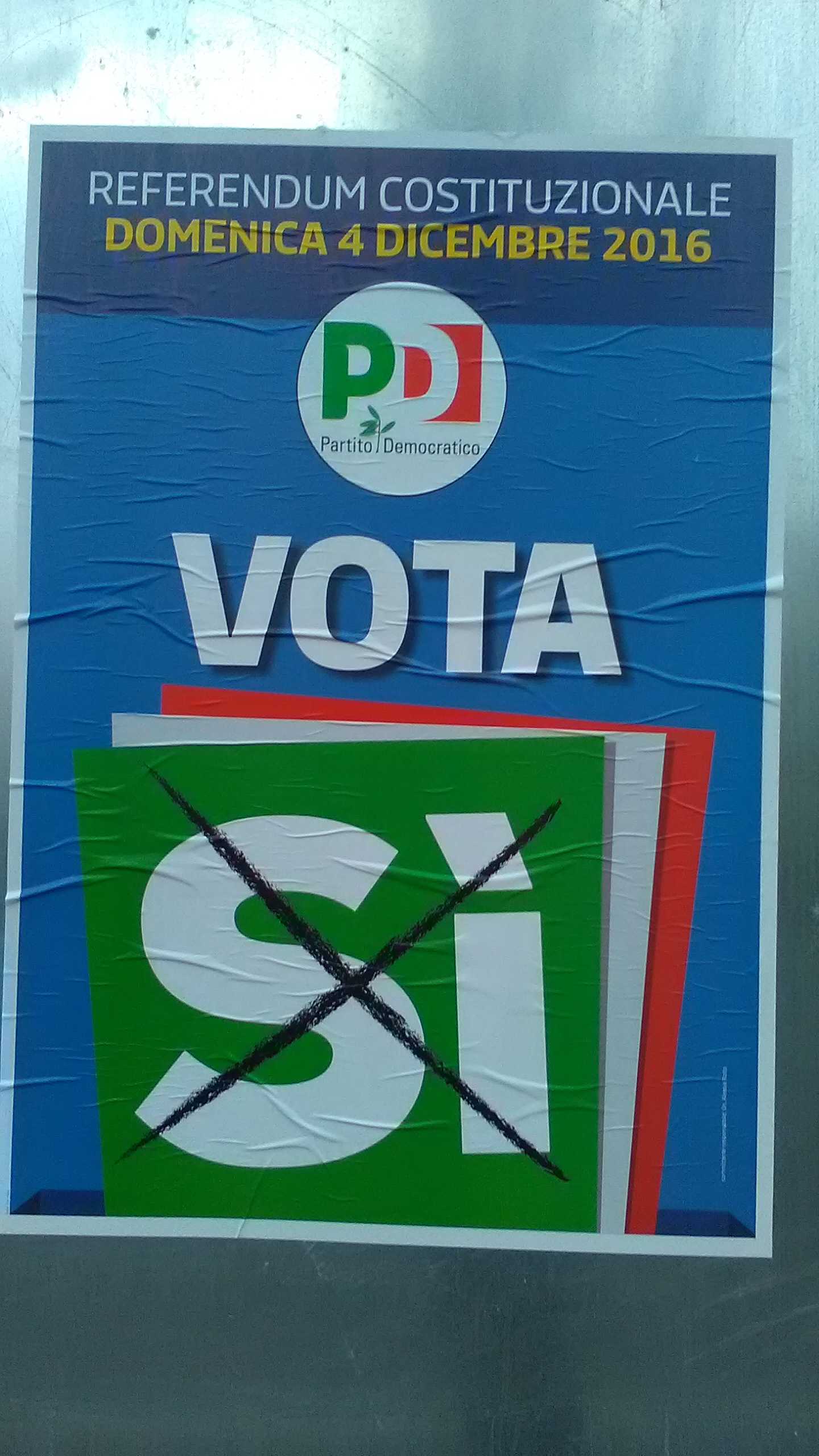 Manifesto PD referendum costituzionale 2016 (agnelli)